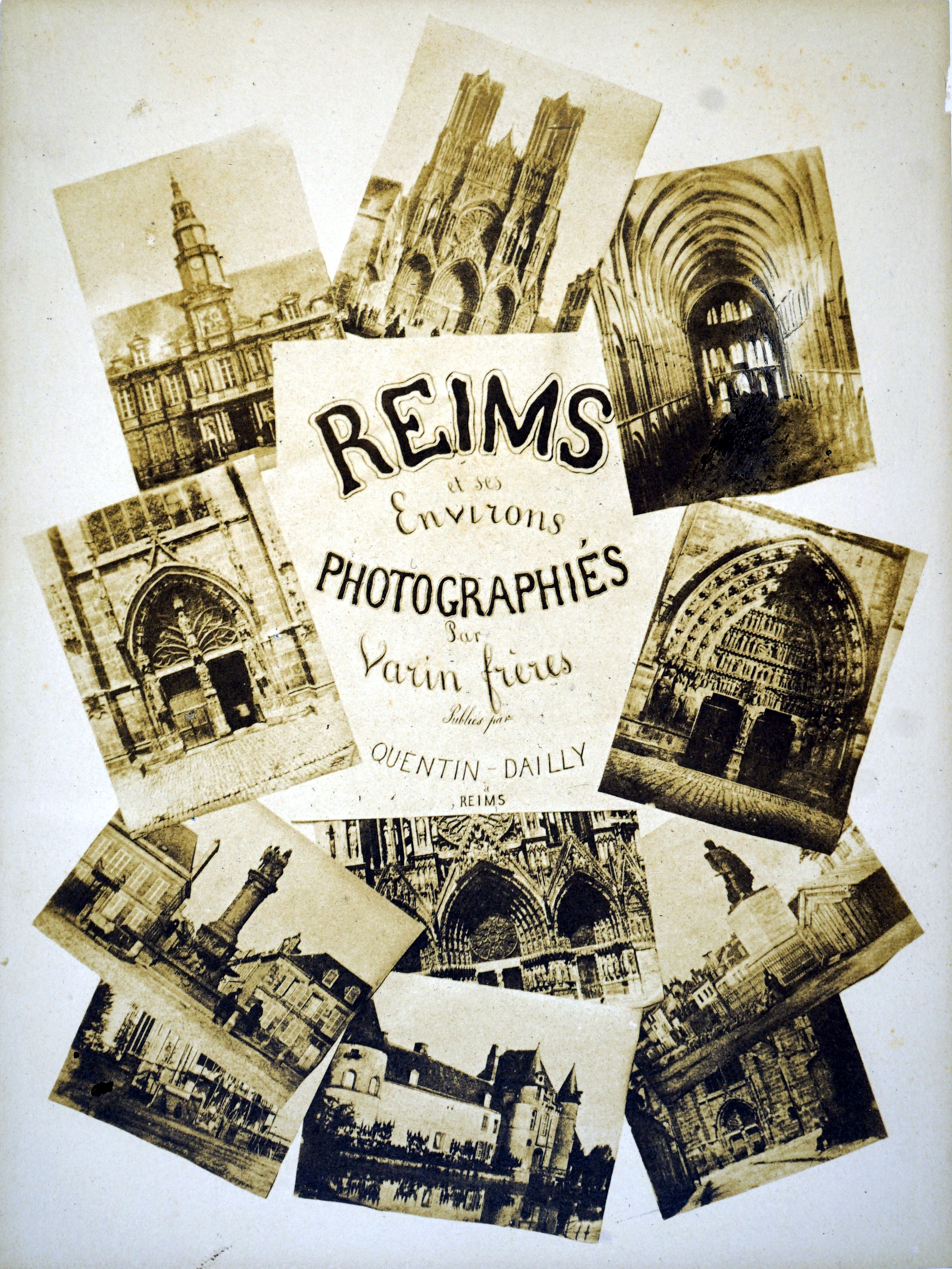 photographié par Varin.